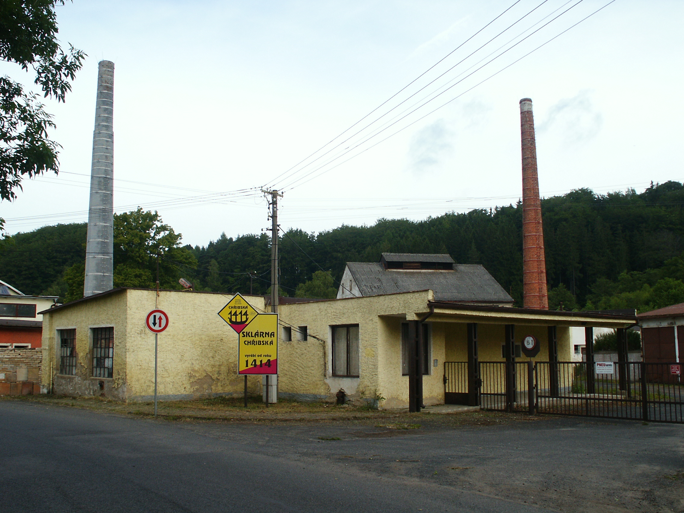 Horní Chřibská - sklárna (č.p. 180)